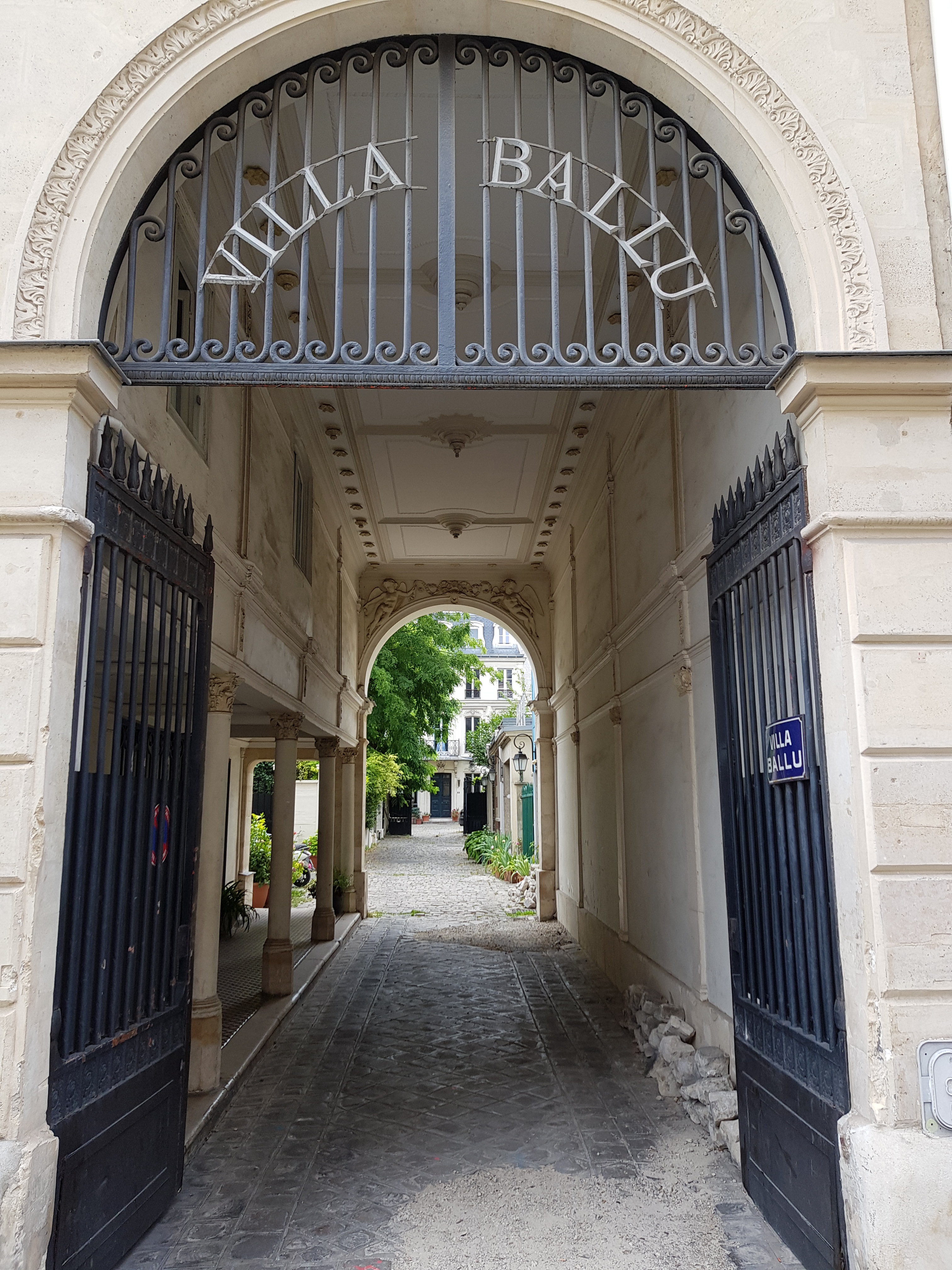 Villa Ballu, Paris 9e.